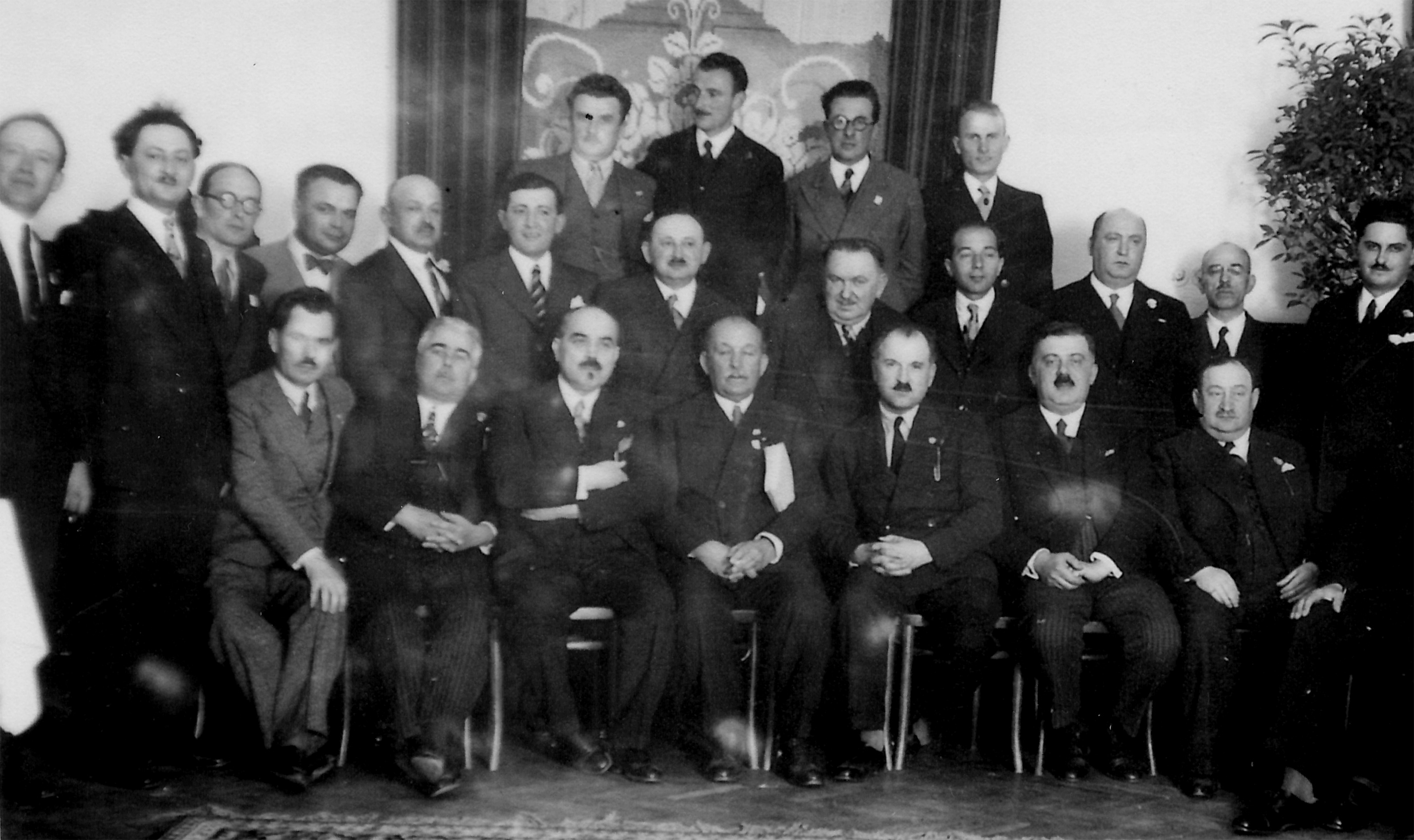 Cernăuţi, anii '30, sec. al XX-leaRomână: Cernăuţi, anii '30, sec. al XX-lea